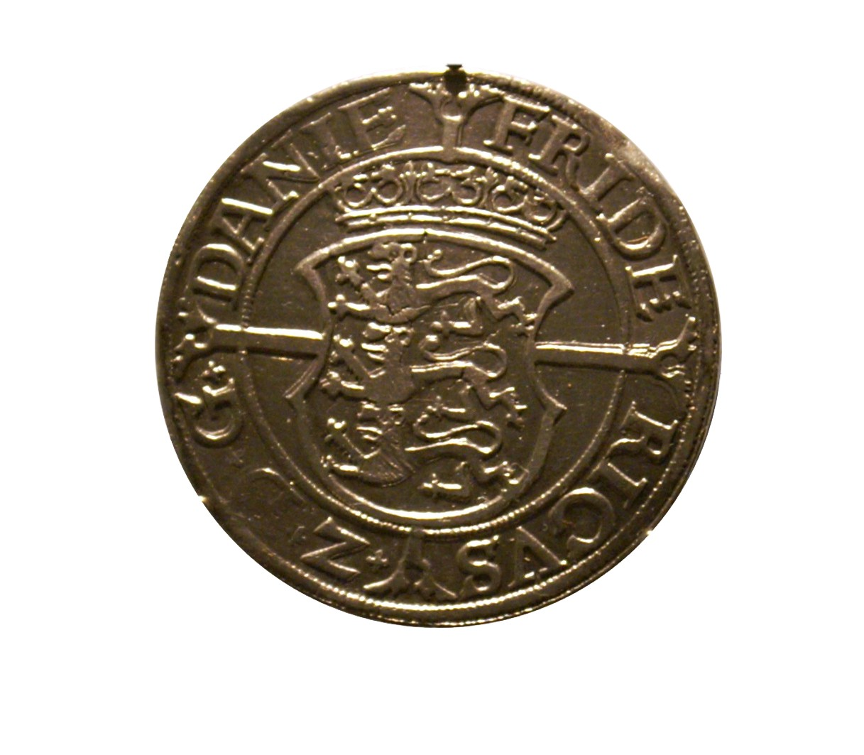 Dänemark, König Friedrich II. (1559-88), Taler, 1563, Kopenhagen